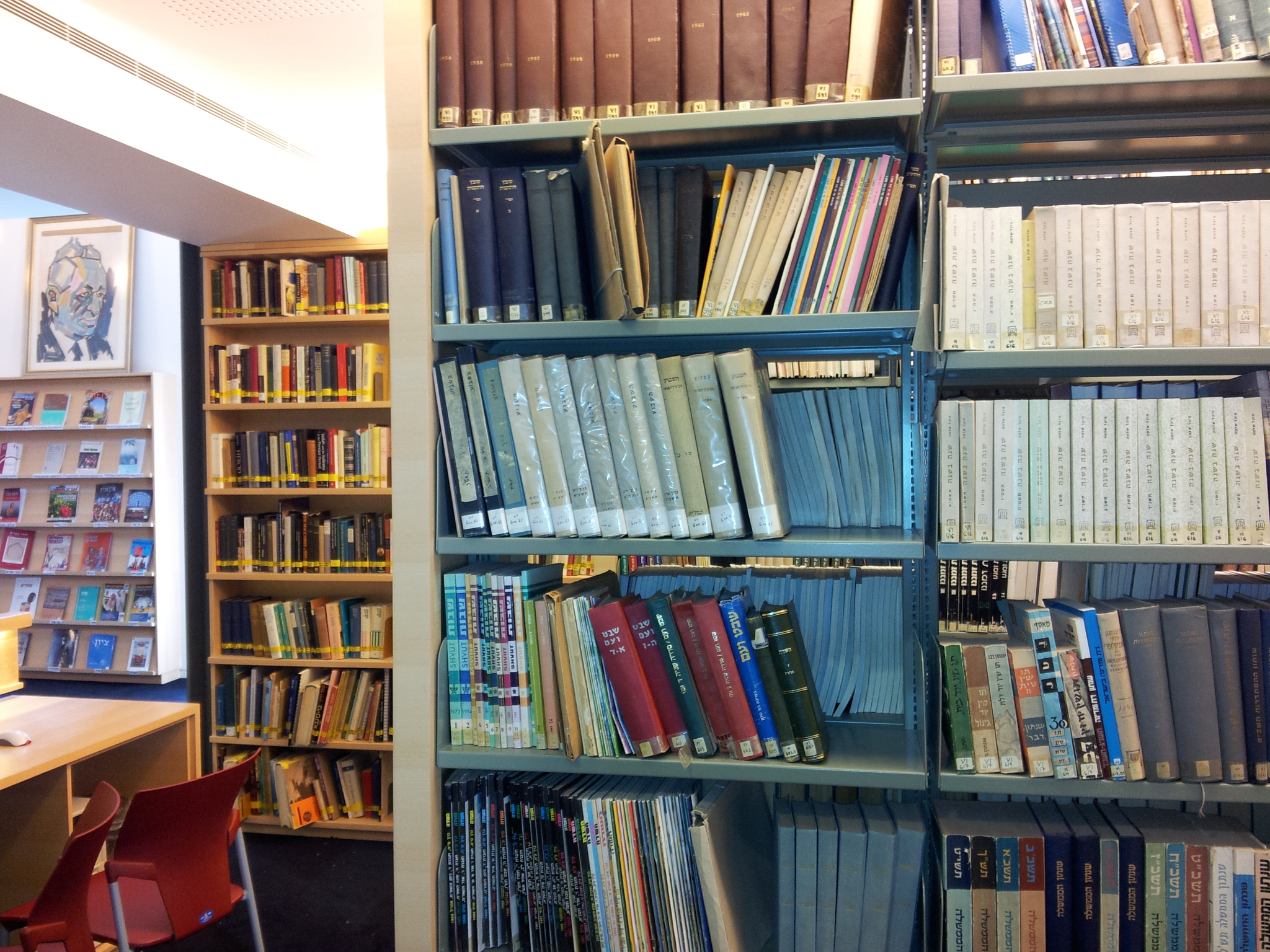 מראה בספרית יד יצחק בן צבי בירושלים